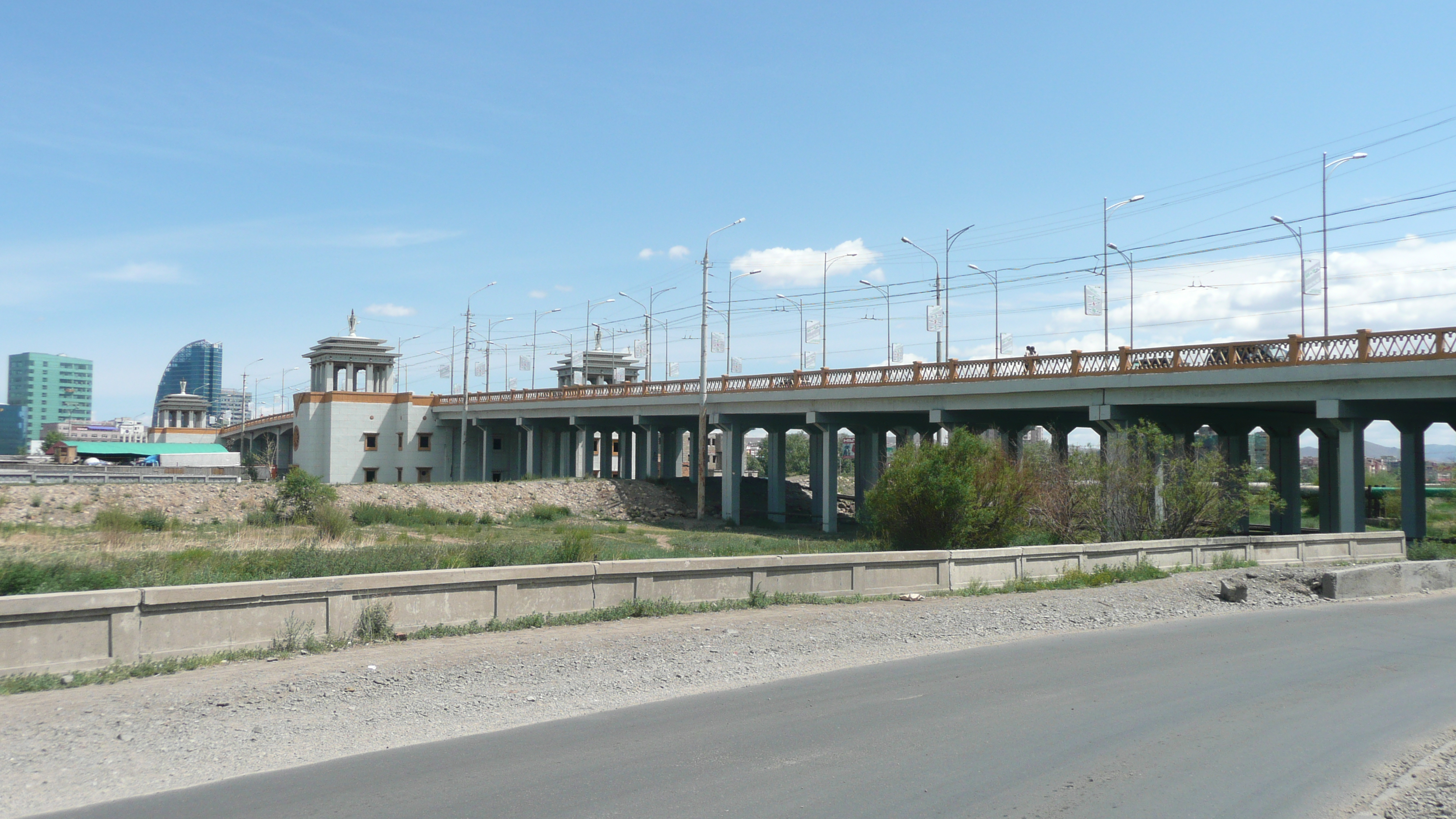 Brücke in Ulan Bator